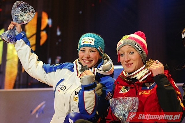 Elena Runggaldier i Daniela Iraschko podczas ceremonii medalowej po konkursie kobiet na Mistrzostwach Świata w Narciarstwie Klasycznym 2011 w Oslo.